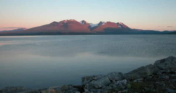 Das Akkagebirge im Nationalpark Stora Sjöfallet Nordschweden gesehen von Ritsem